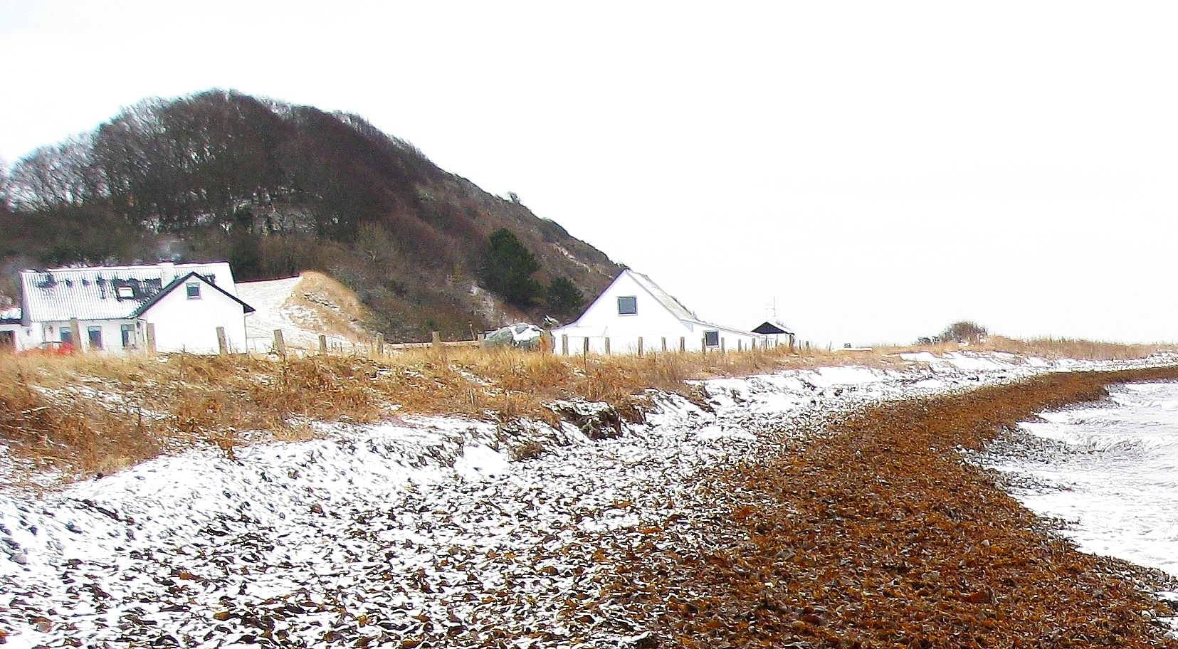 Jernhatten, set fra stranden, vinter